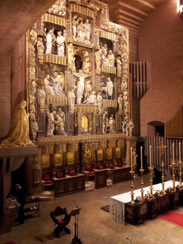 Interior del Santuario de Torreciduad